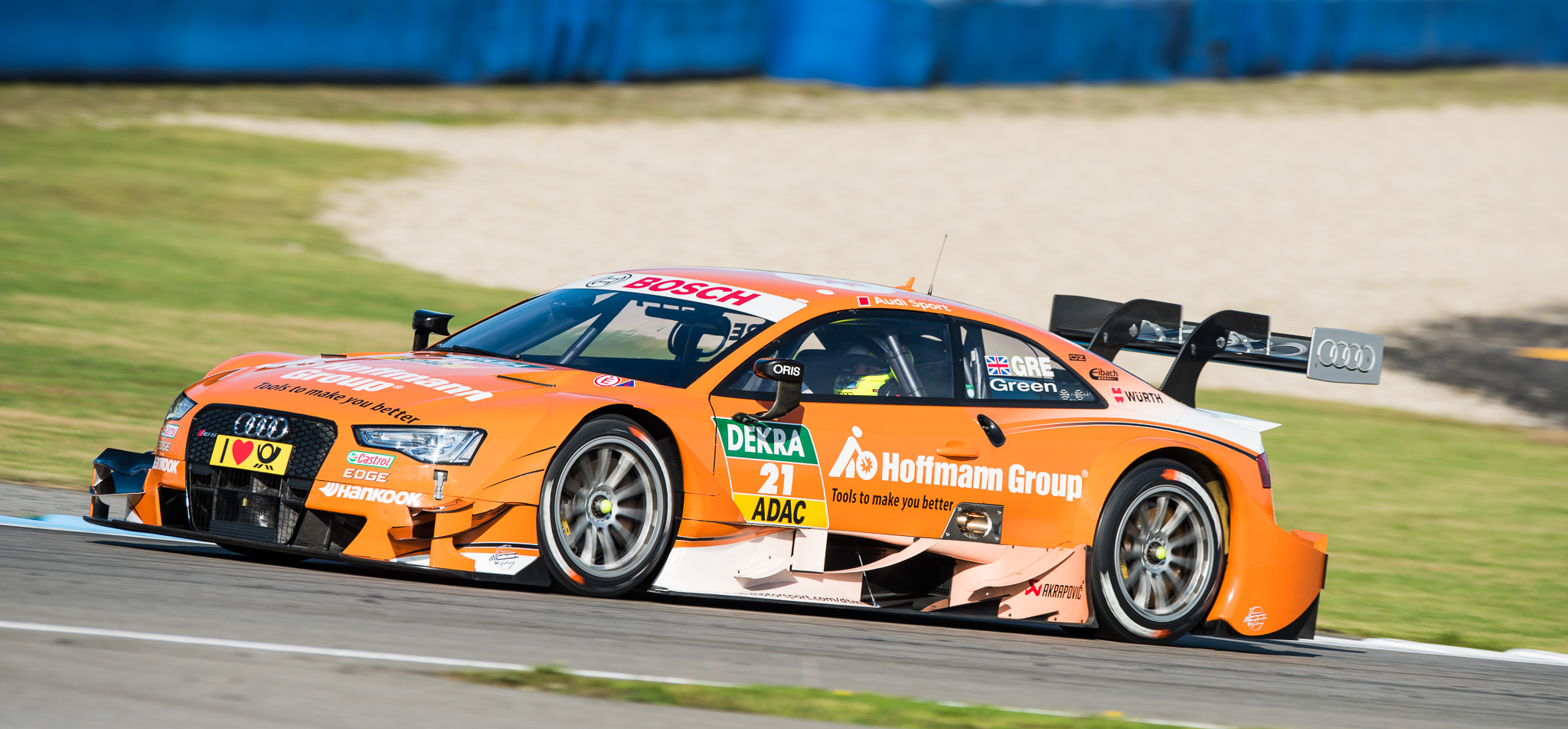 DTM,Deutsche Tourenwagen Masters,Hockenheimring,Hoffmann Group Audi RS 5 DTM,Jamie Green,Motorsport,Team Rosberg GmbH